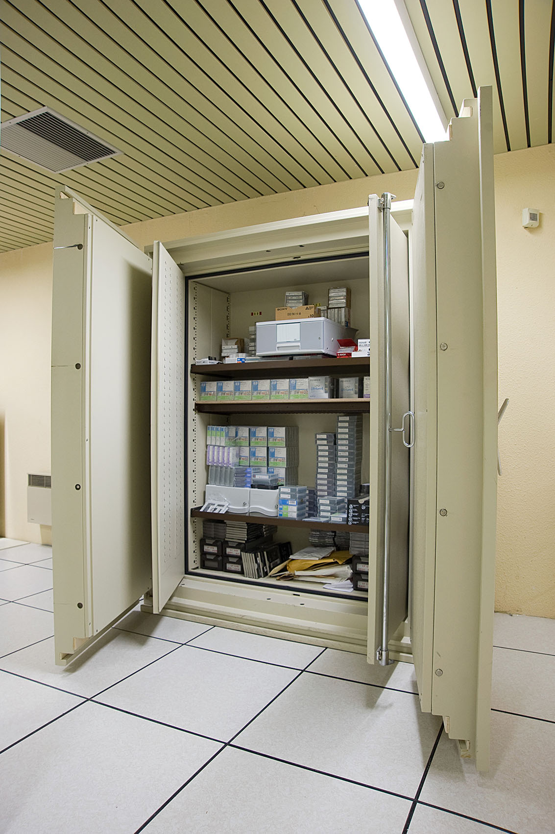 L'armoire de fer des Archives nationales, site de Fontainebleau, est le pendant contemporain de l'armoire de fer des Grands dépôts du site parisien des Archives nationales.